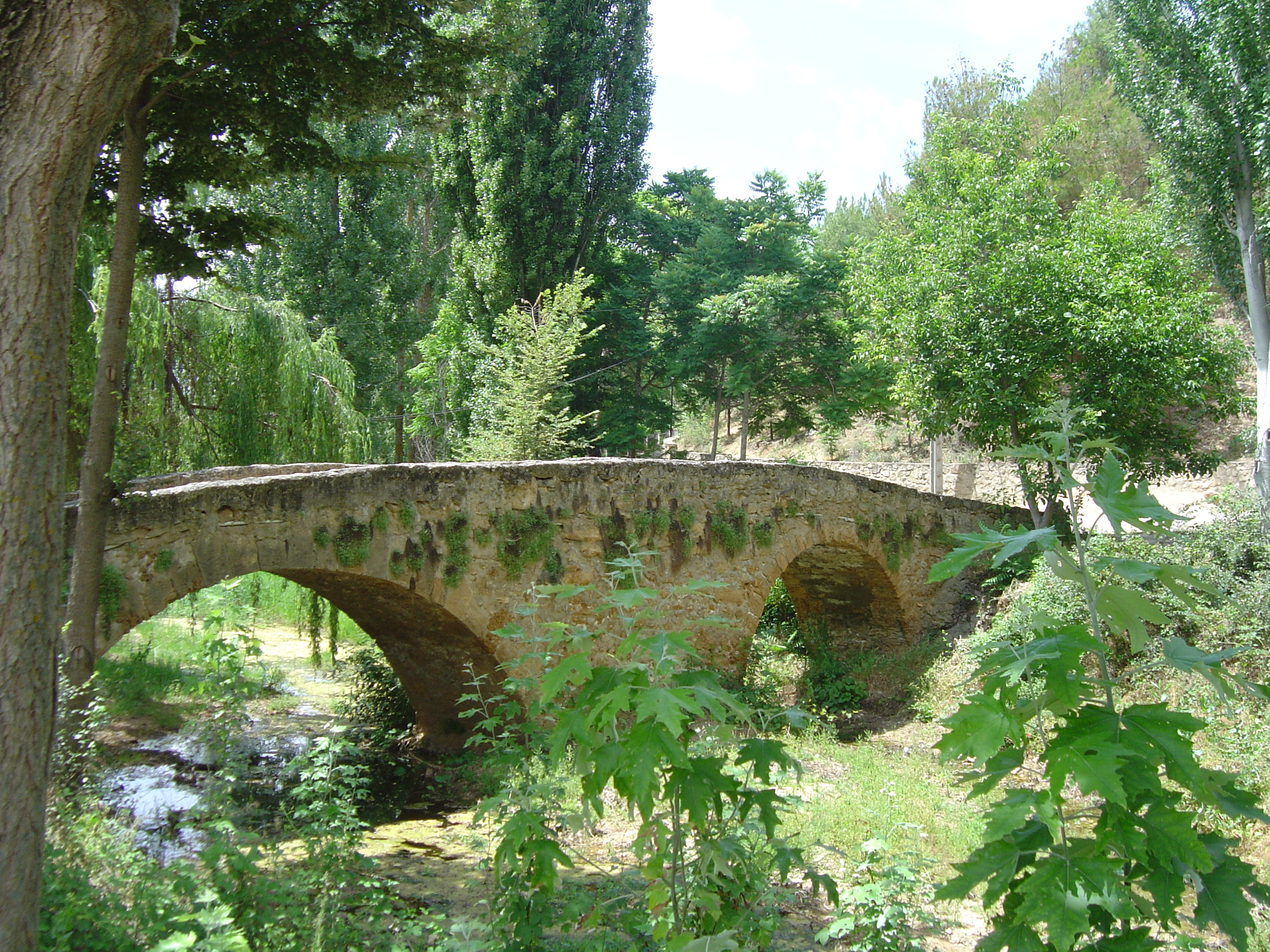 ALBALATE DE LAS NOGUERAS7